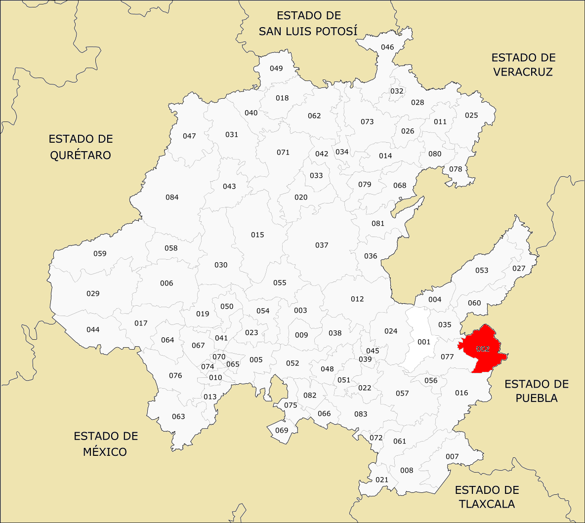 002 Municipio de Hidalgo